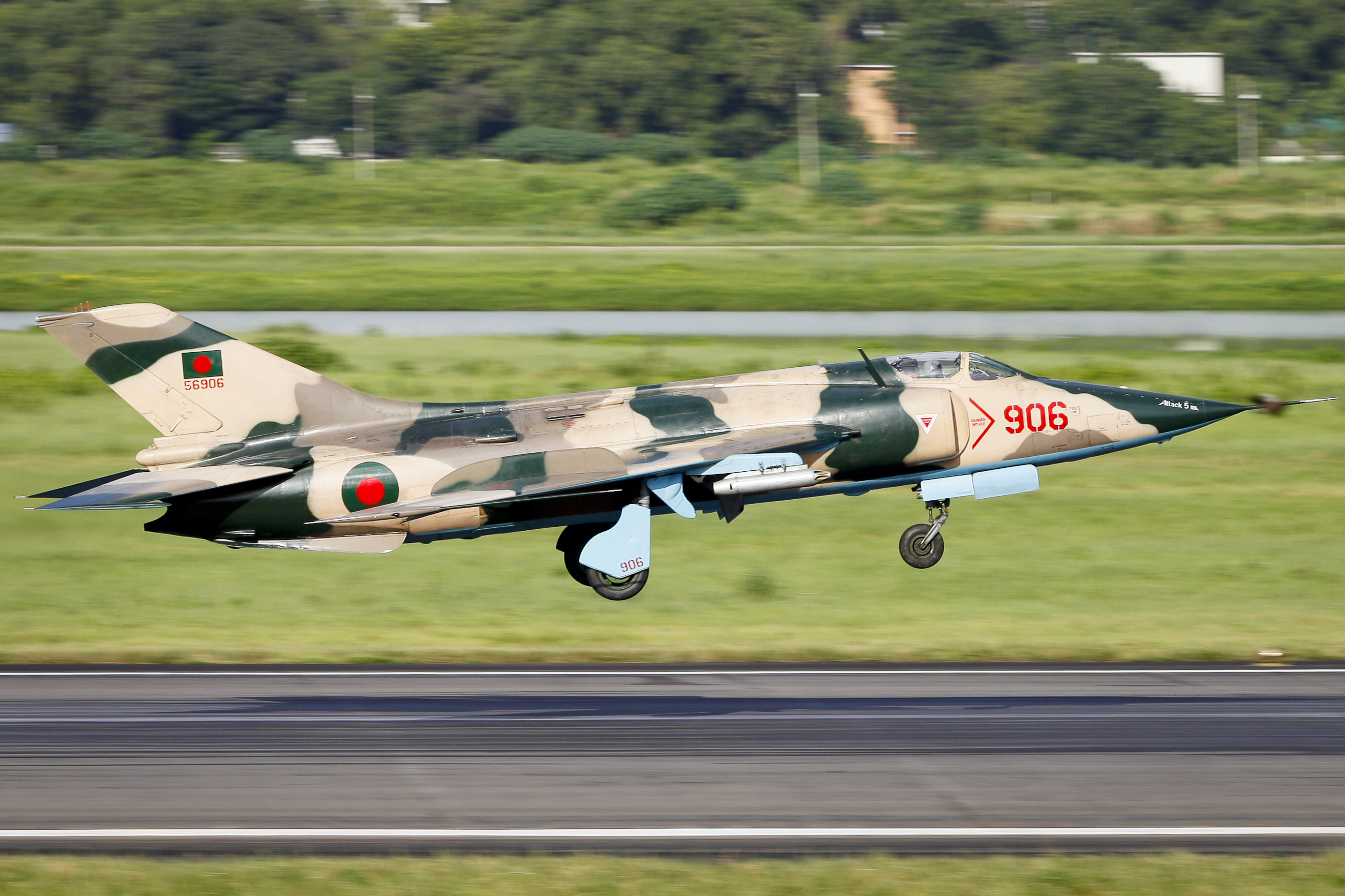 906 Nanchang A-5 Landing